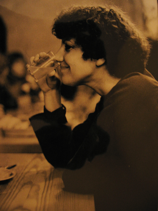 Jiřina Lhotská v roce 1980